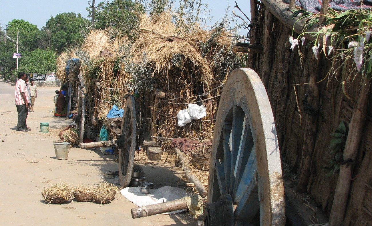 സീതപ്പഴങ്ങൾ നിറച്ച ലംബാടികളുടെ കാളവണ്ടികൾ. ഹൈദരാബാദ് നഗരഹ്യദയത്തിൽ നിന്നൊരു കാഴ്ച.